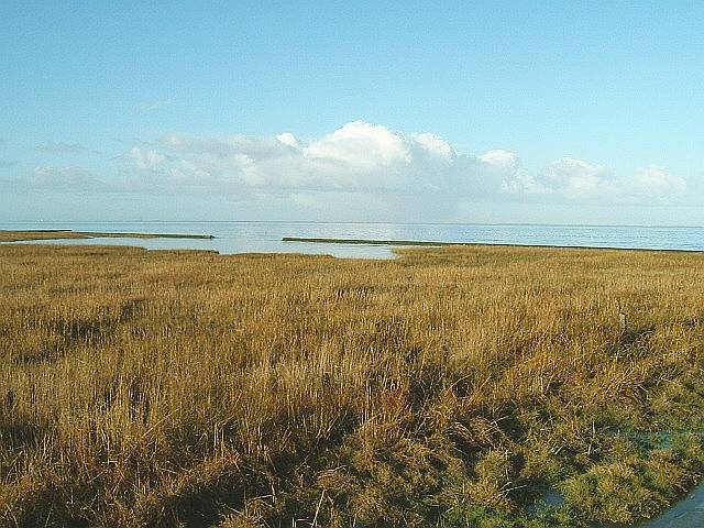 Küstenlandschaft bei Dornum (Nessmersiel)